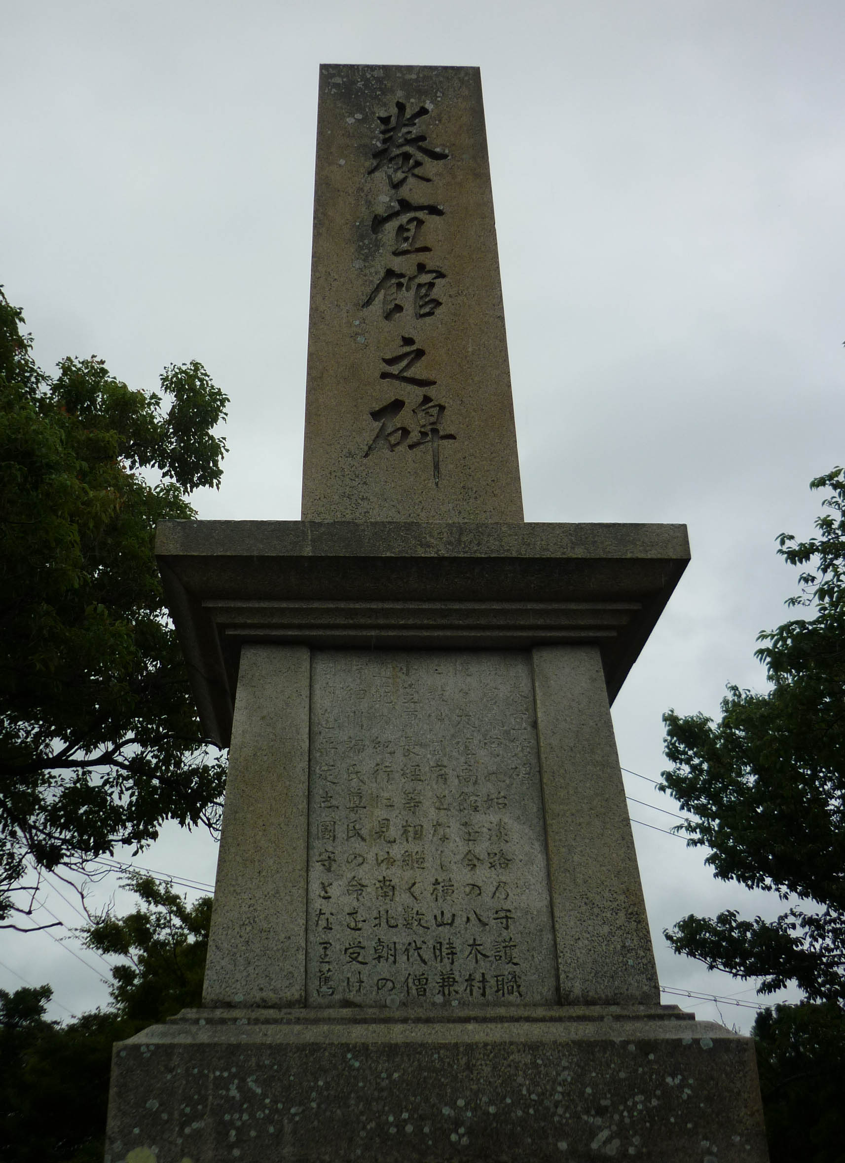 養宜館之碑